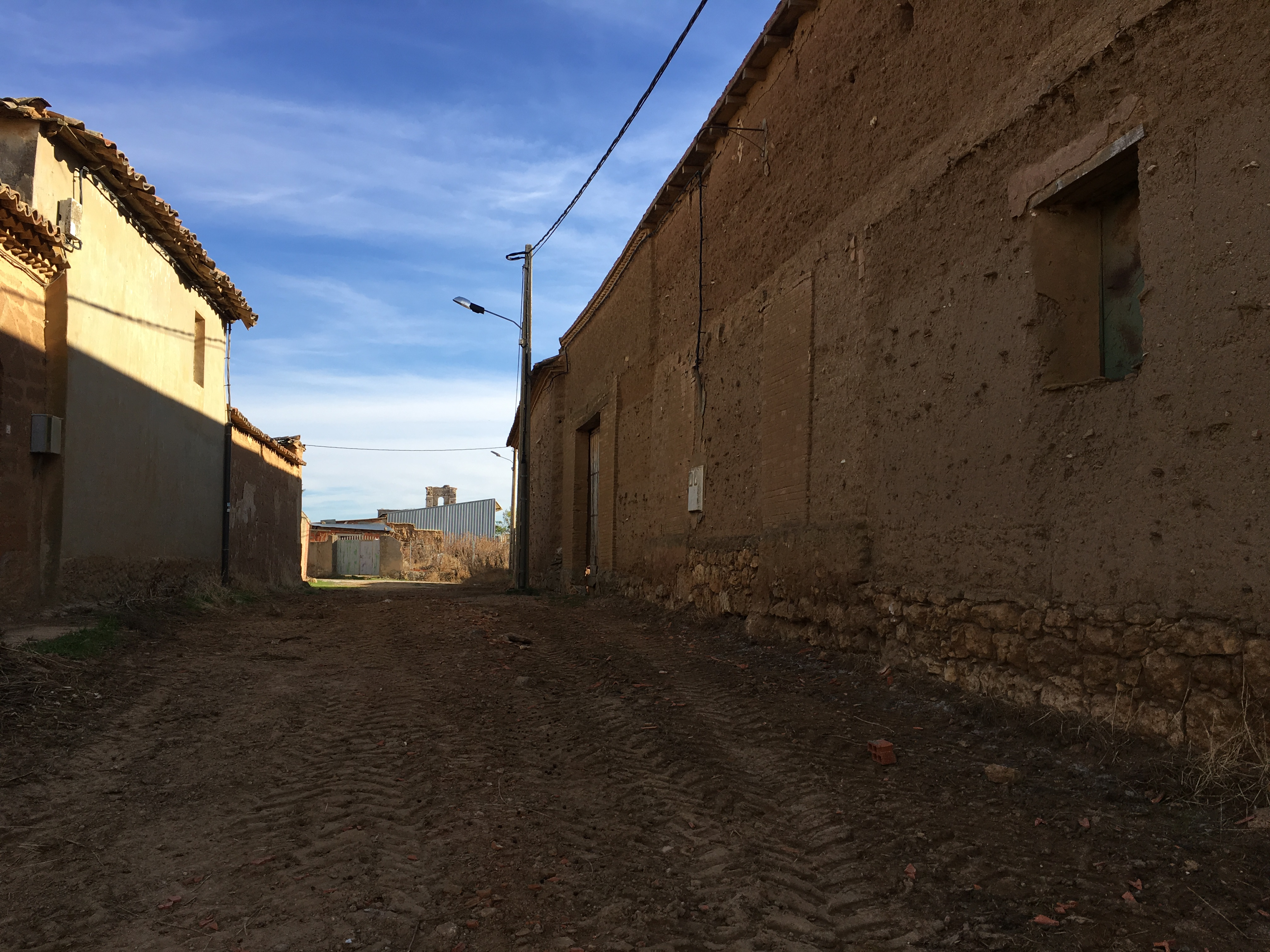 Villaesper Milenario